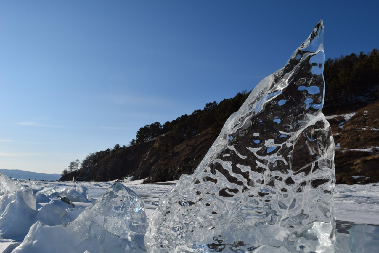 Листвянка, Иркутский район This image is related to the protected area of Russia number 3810100